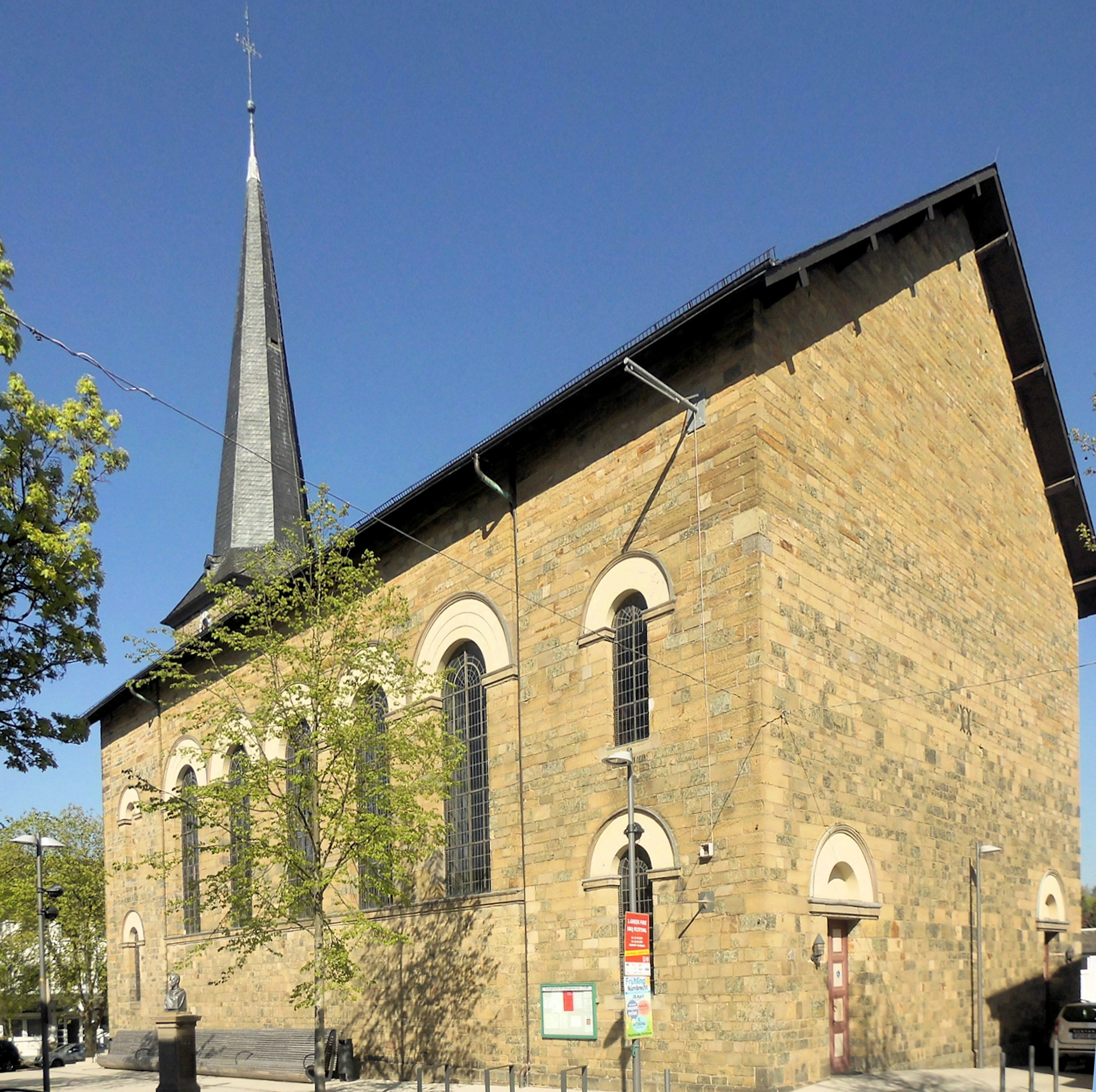 Ostseite der evangelischen Kirche Waldbröl, Deutschland